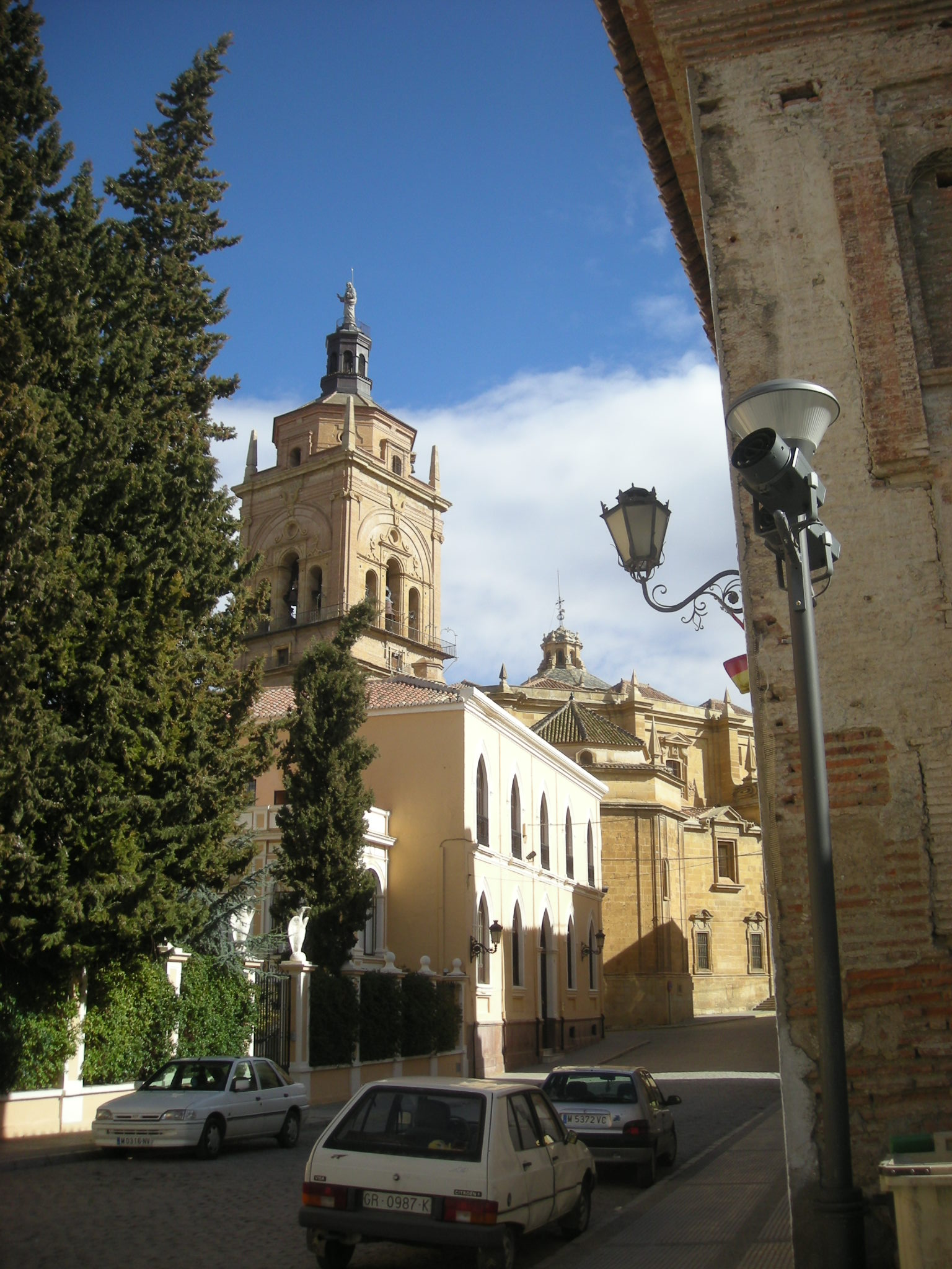 Calle de Santa María del Aire, en Guadix.